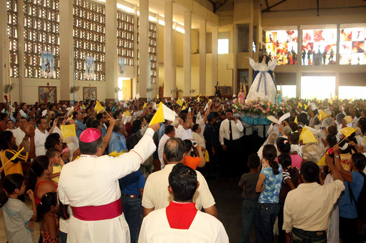 Foto tomada el 15 de agosto 2011